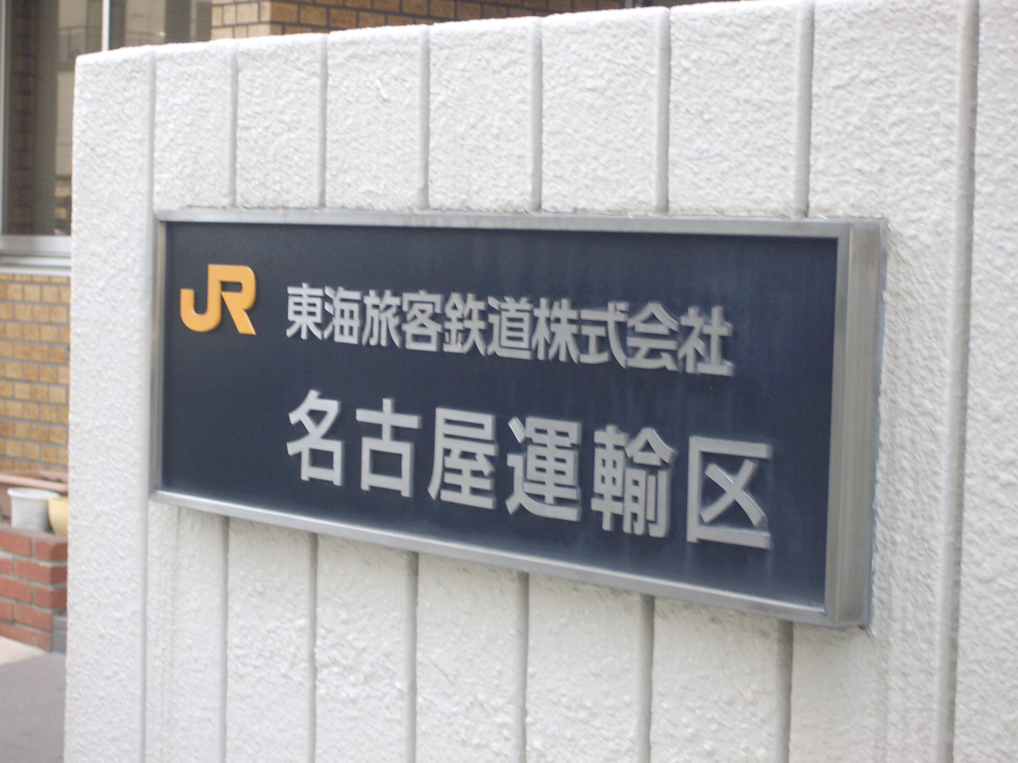 JR東海・東海鉄道事業本部（在来線）の運転士と車掌が所属する名古屋運輸区の表札 ㊟カメラを起動すると日付機能が出荷時のものに初期化されるため、ファイル履歴の投稿日時とメタデータの原画像データの生成日時が異なります（本概要欄の下記日付が撮影日）